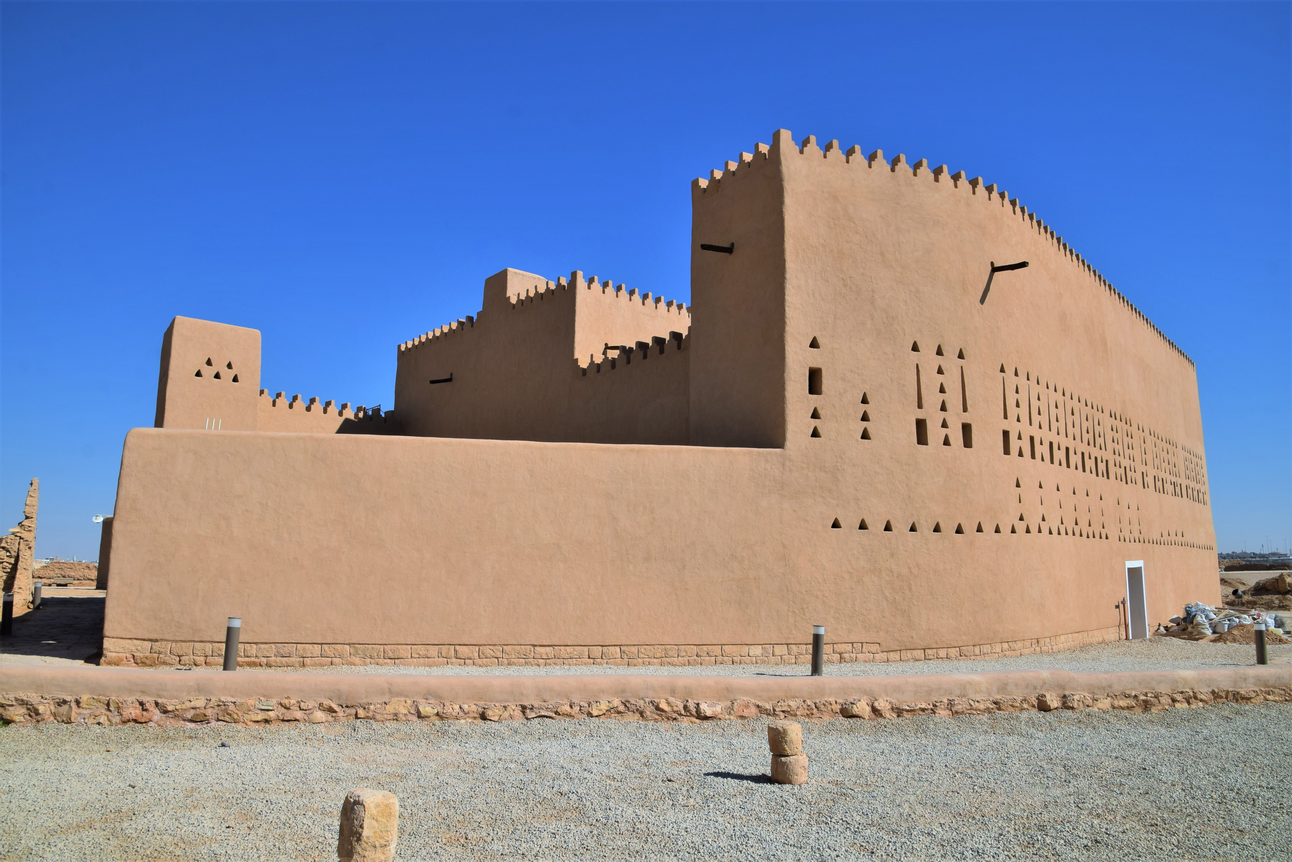 هو قصر الأمير سعد بن سعود بن عبدالعزيز بن محمد بن سعود، أحد أبناء الإمام سعود بن عبدالعزيز ثالث أئمة الدولة السعودية الأولى